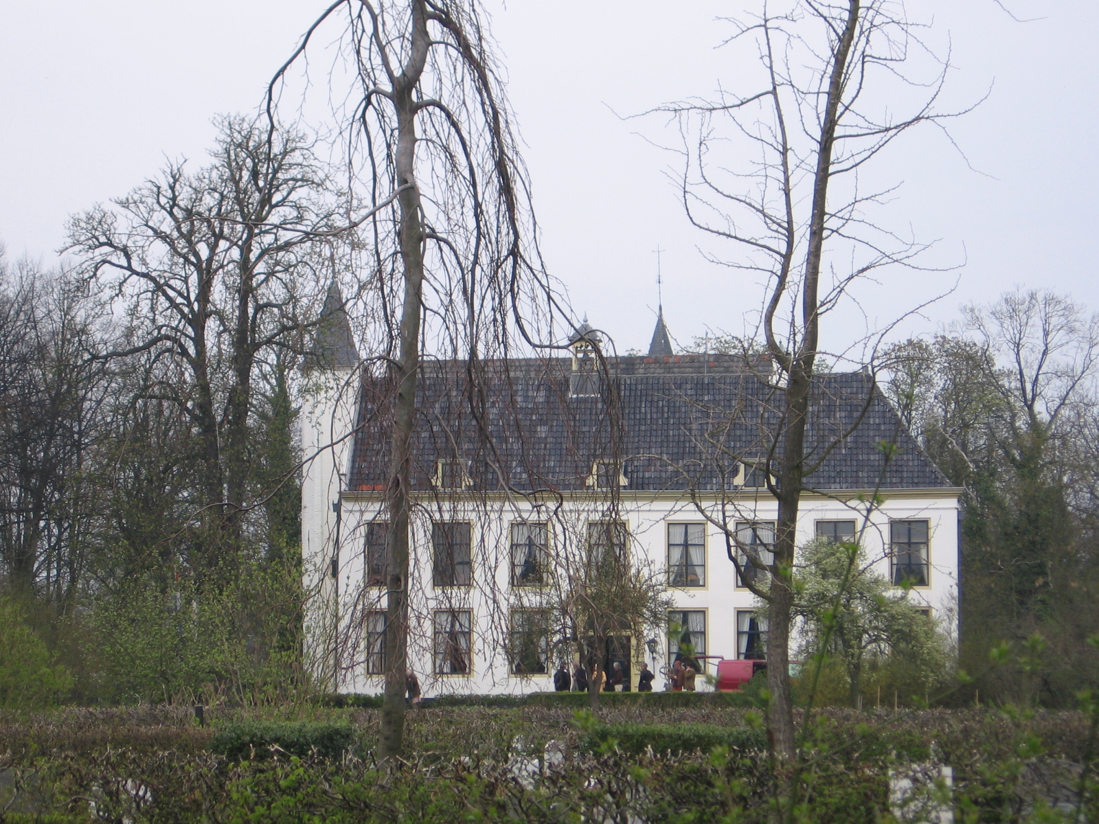 Rhoon, Albrandswaard